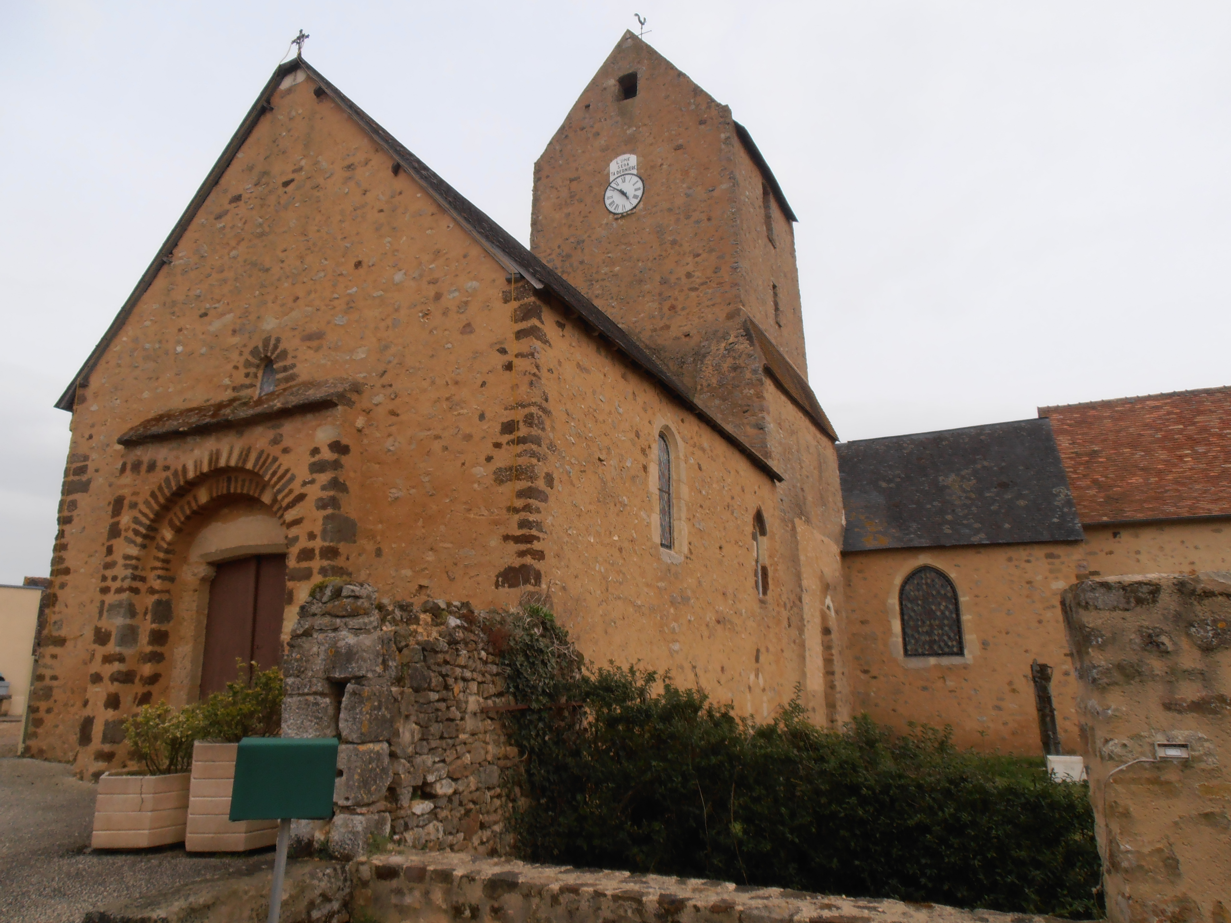 Vue d'ensemble de l'église de Mareil-en-Champagne